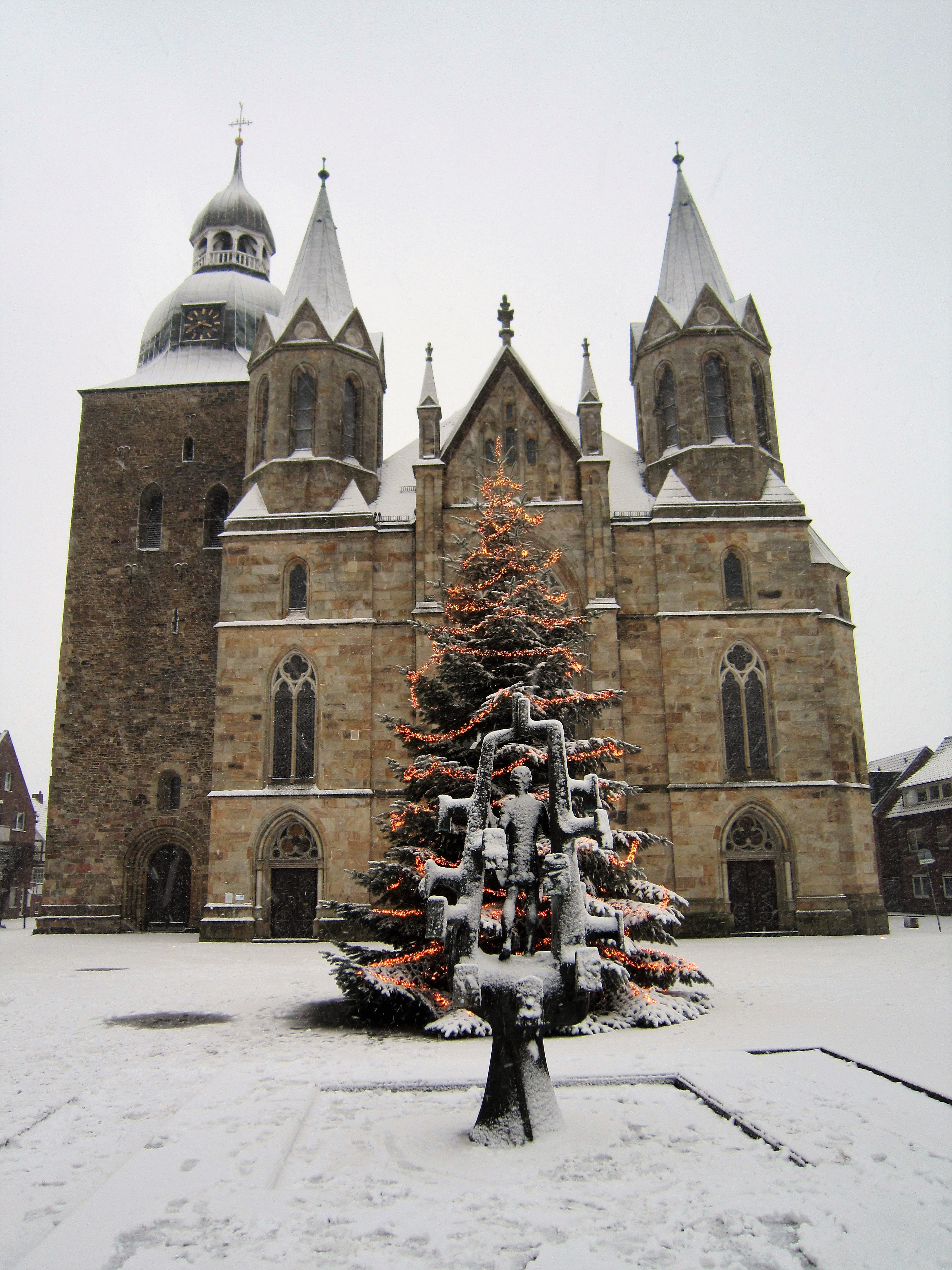 Viktorbrunnen, Weihnachtsbaum und Kirche St. Viktor in Damme